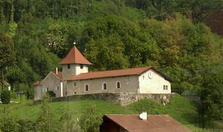 Église Saint-Barthélemy, Sainte-Marie-d'Alloix, Isère, AuRA, France.